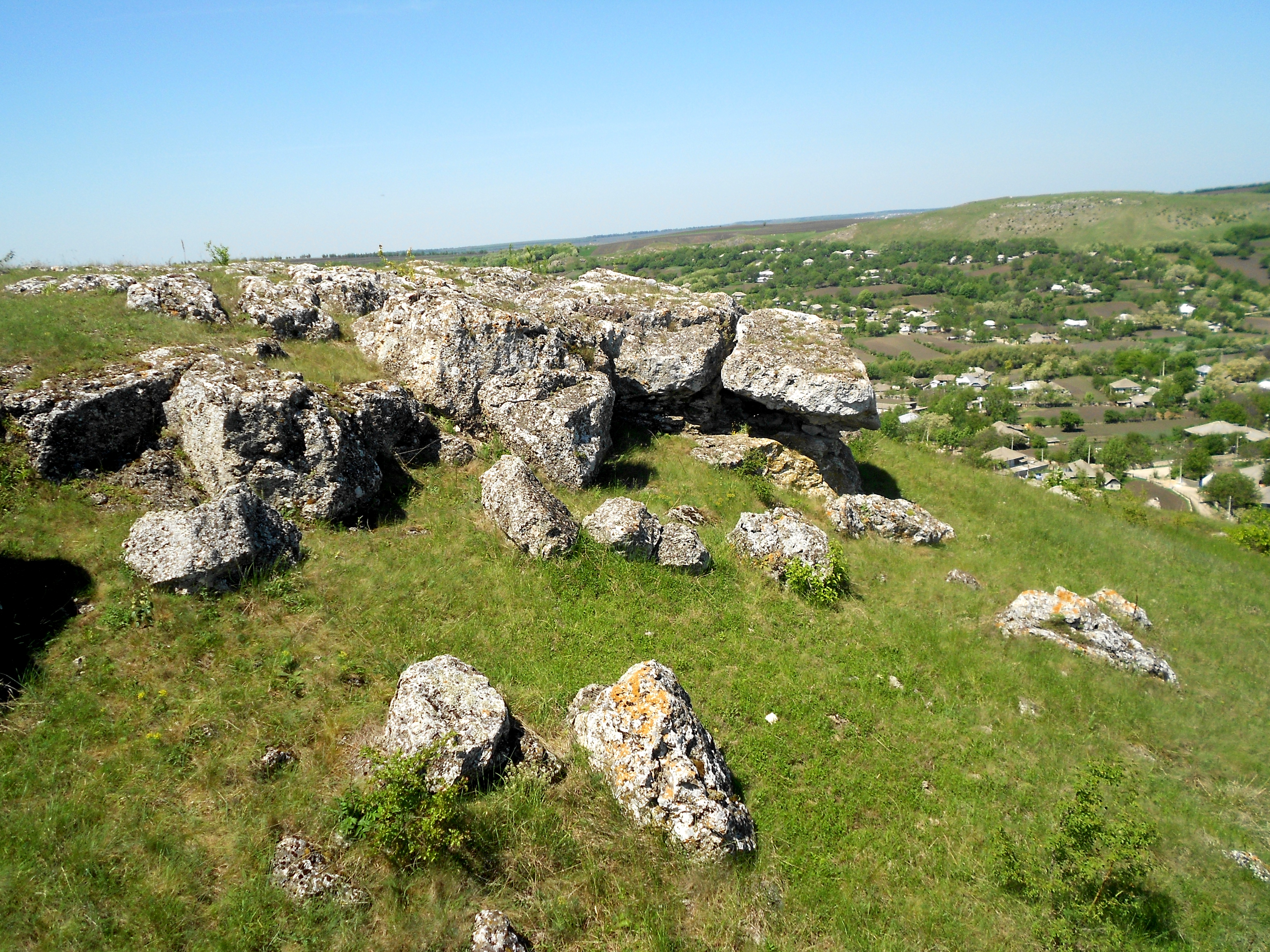 Toltre în apropiere de s. Fetești, r. Edineț